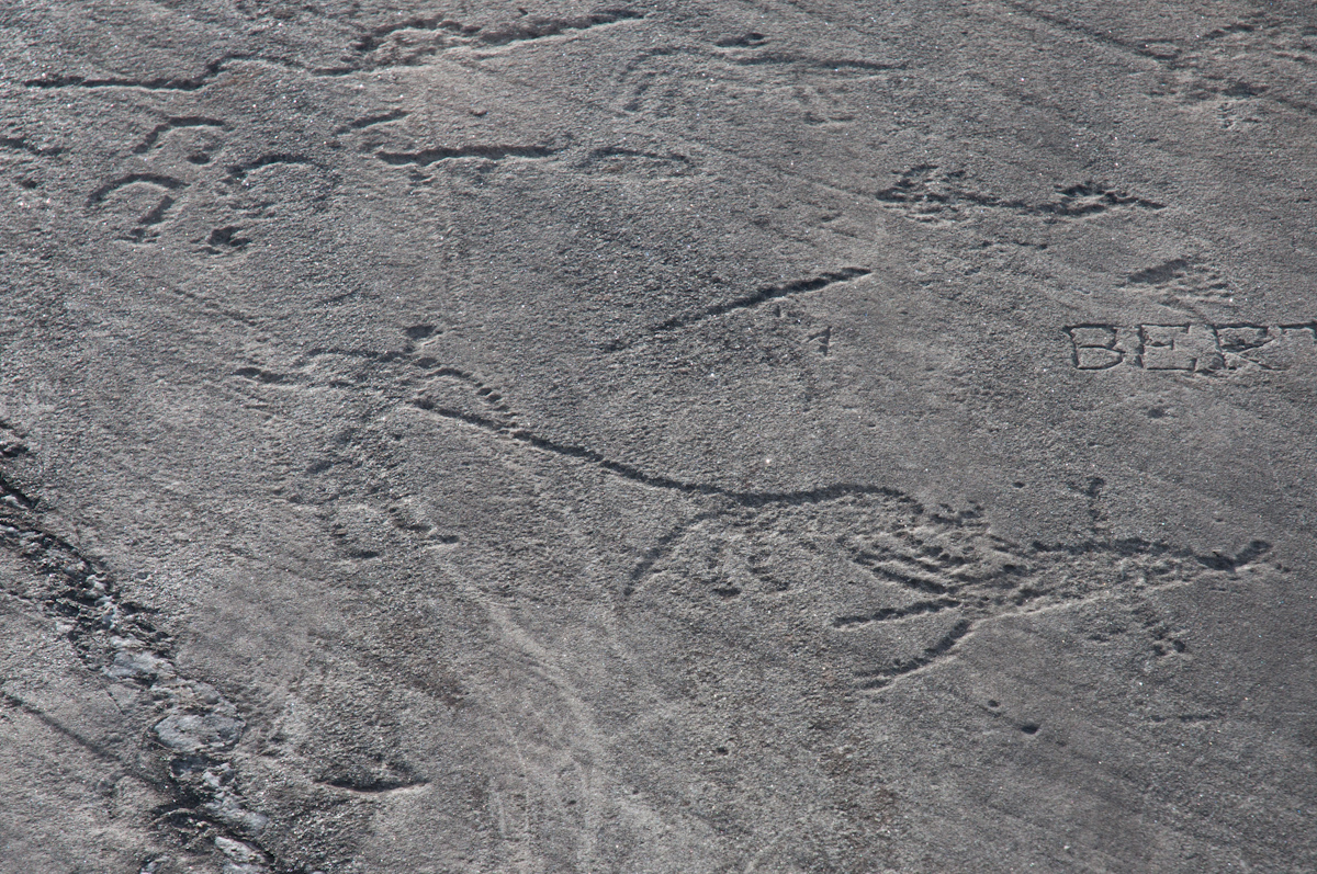 Gravure préhistorique issue du parc archeologique des lozes en haute maurienne dans le parc de la Vanoise (France).